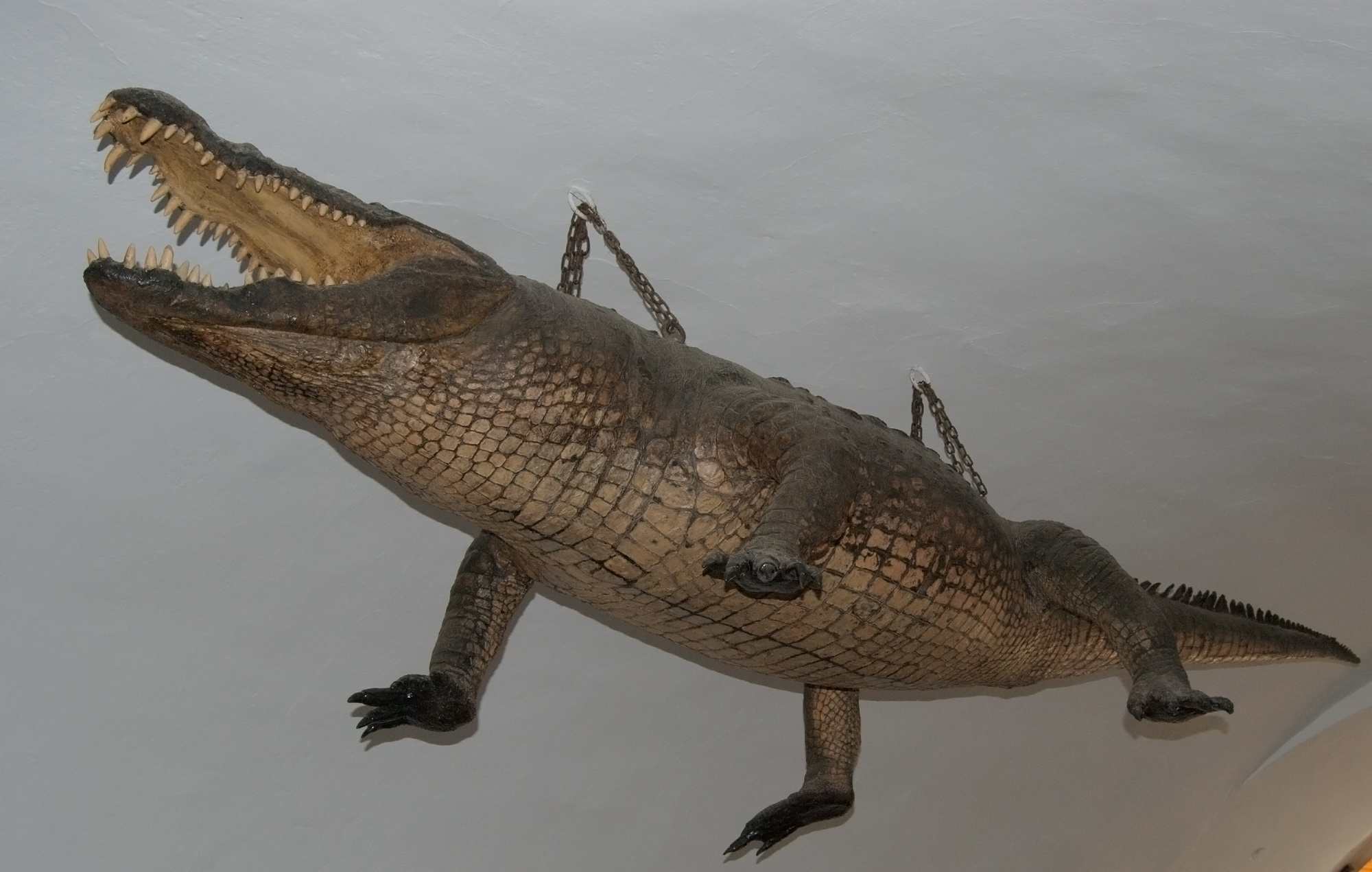 tzv. „Brněnský drak“ na stropu průjezdu brněnské Staré radnice